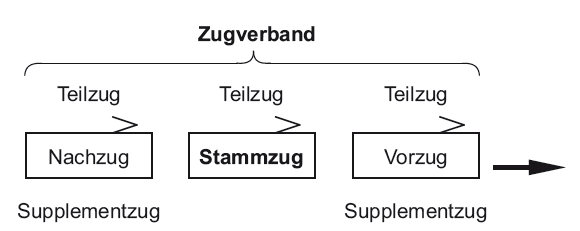 Der Zugverband besteht aus Teilzügen. Diese können Vor-, Stamm-, oder Nachzug sein, wobei Vor- und Nachzüge als Supplementzüge bezeichnet werden.